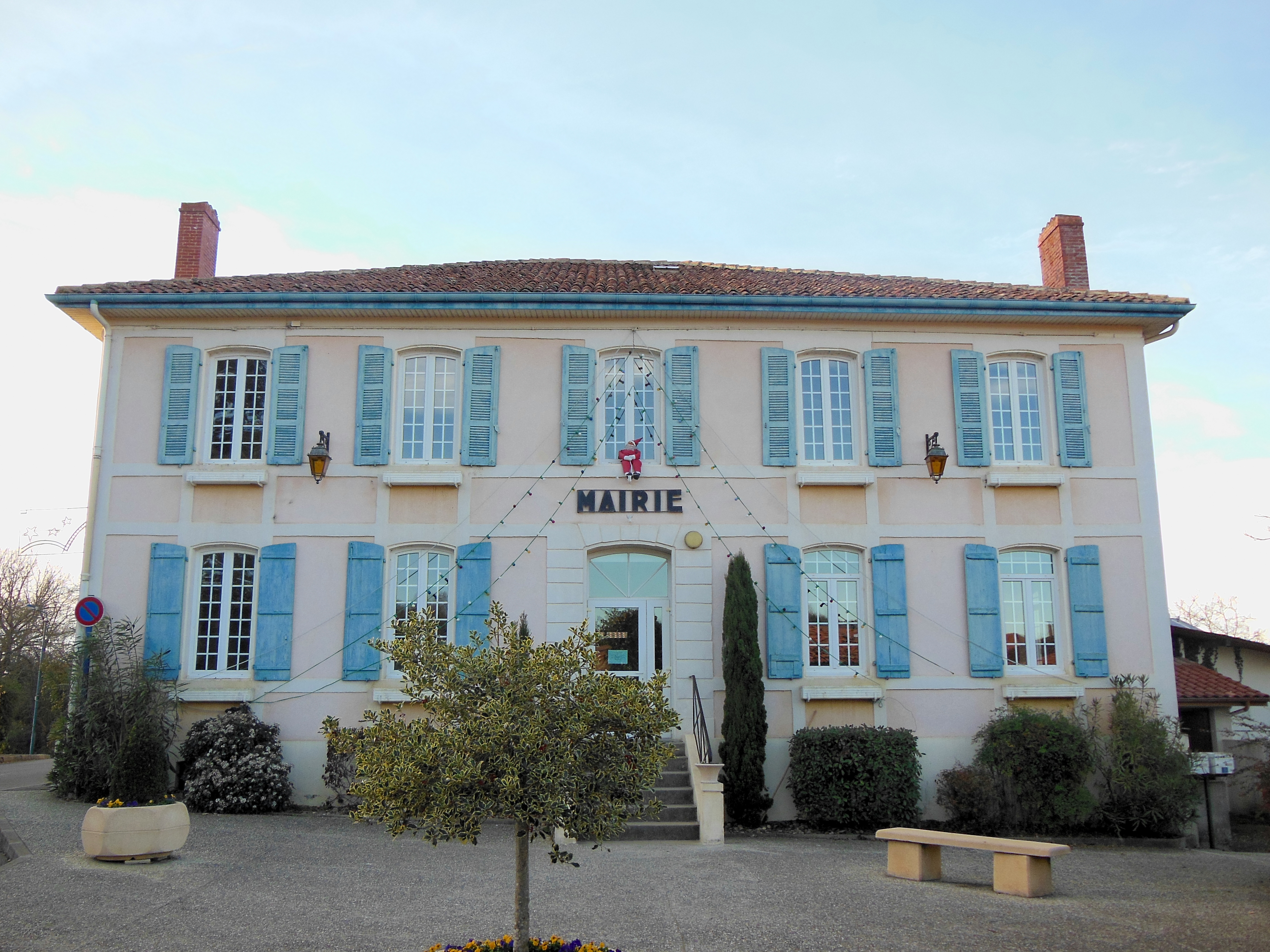 Mairie de Sainte-Colombe (Landes, France)